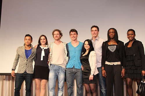 Команда Франции на командном чемпионате мира по фигурному катанию 2012. Слева на право: Флоран Амодьо, Натали Пешала, Фабьян Бурза, Бриан Жубер, Дарья Попова, Бруно Массо, Маэ Беренис Мейт, Ирета Силете.